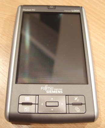 Moderner Pocket PC